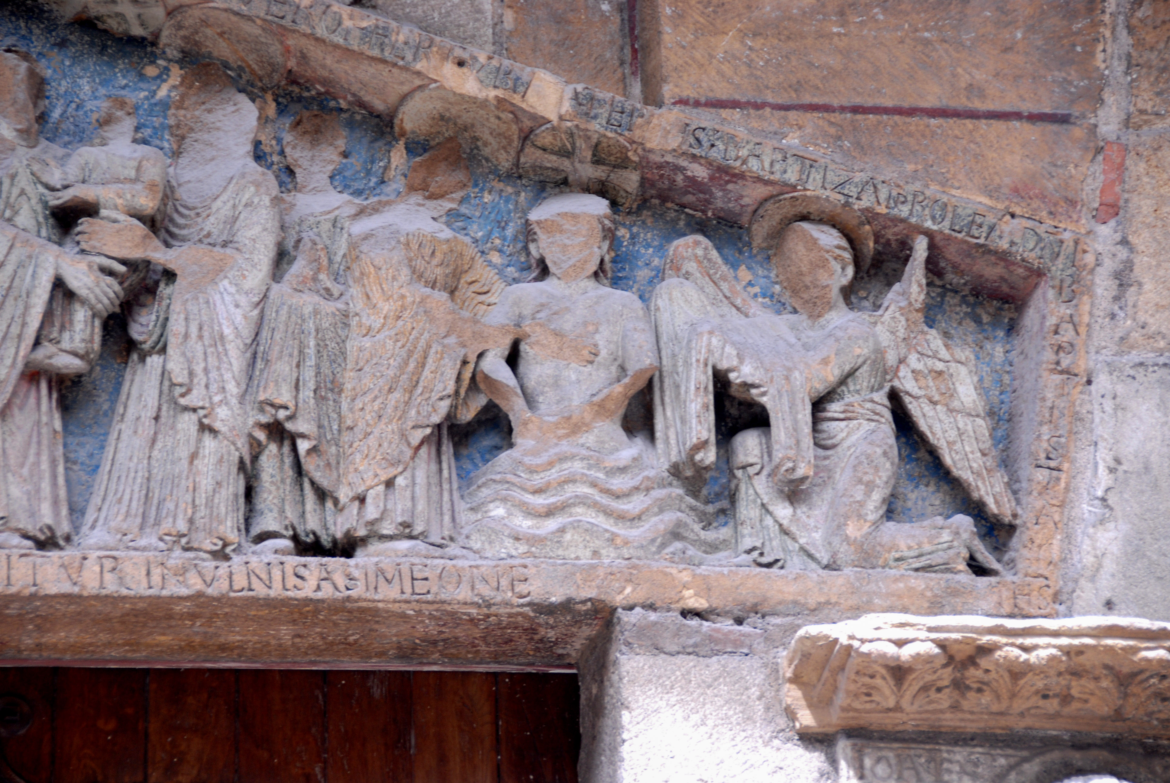 Notre-Dame du Port, Südportal, Sturz, rechte Seite